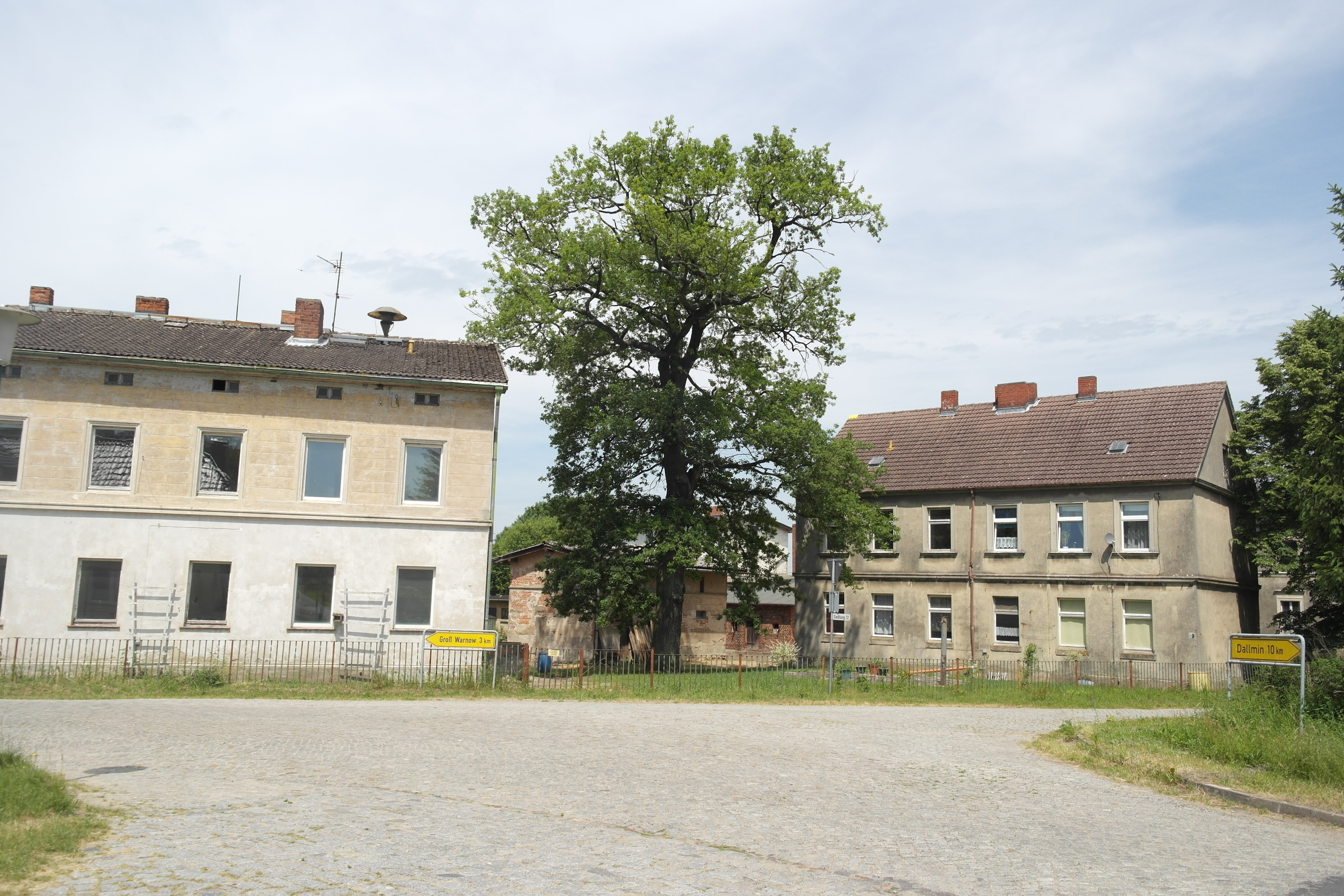 Zwei Beamtenwohnhäuser beim Bf. Klein Warnow, denkmalgeschützt